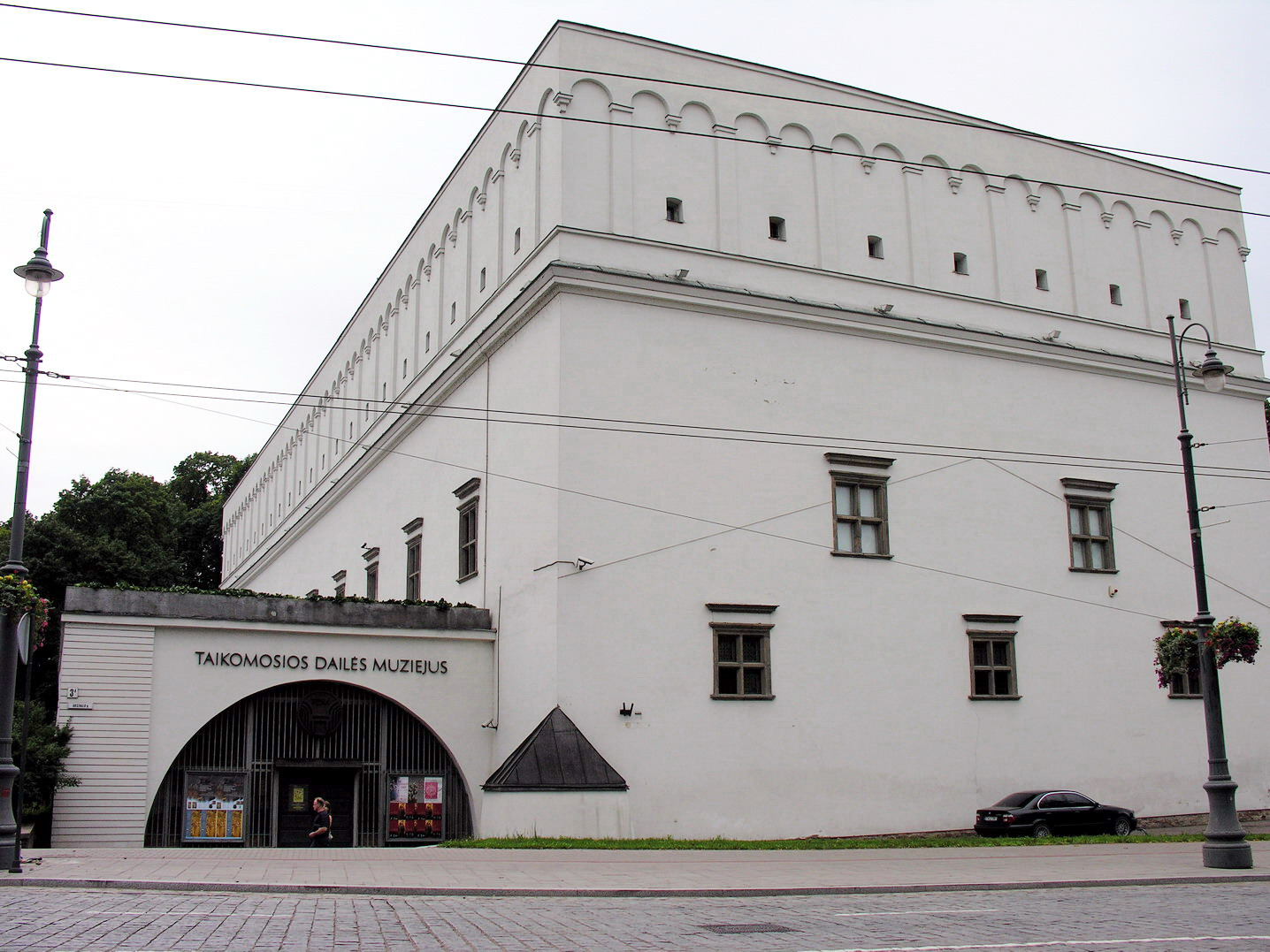 Senasis arsenalas, šiuo metu įsikūręs Taikomosios dailės muziejus. Old Arsenal in Vilnius Castle Complex, currently Museum of Applied Art.